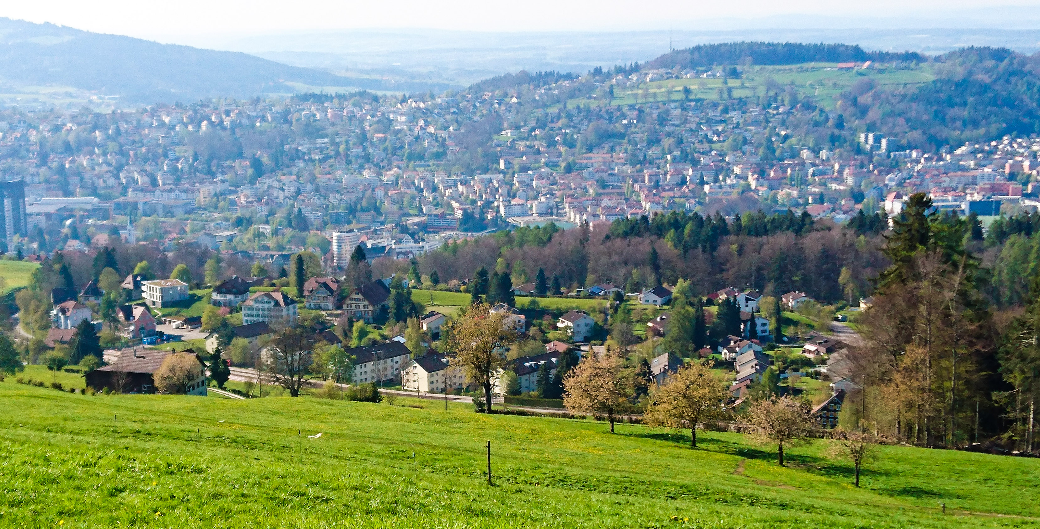 Das St. Galler Quartier Notkersegg südlich vom Kapf gesehen